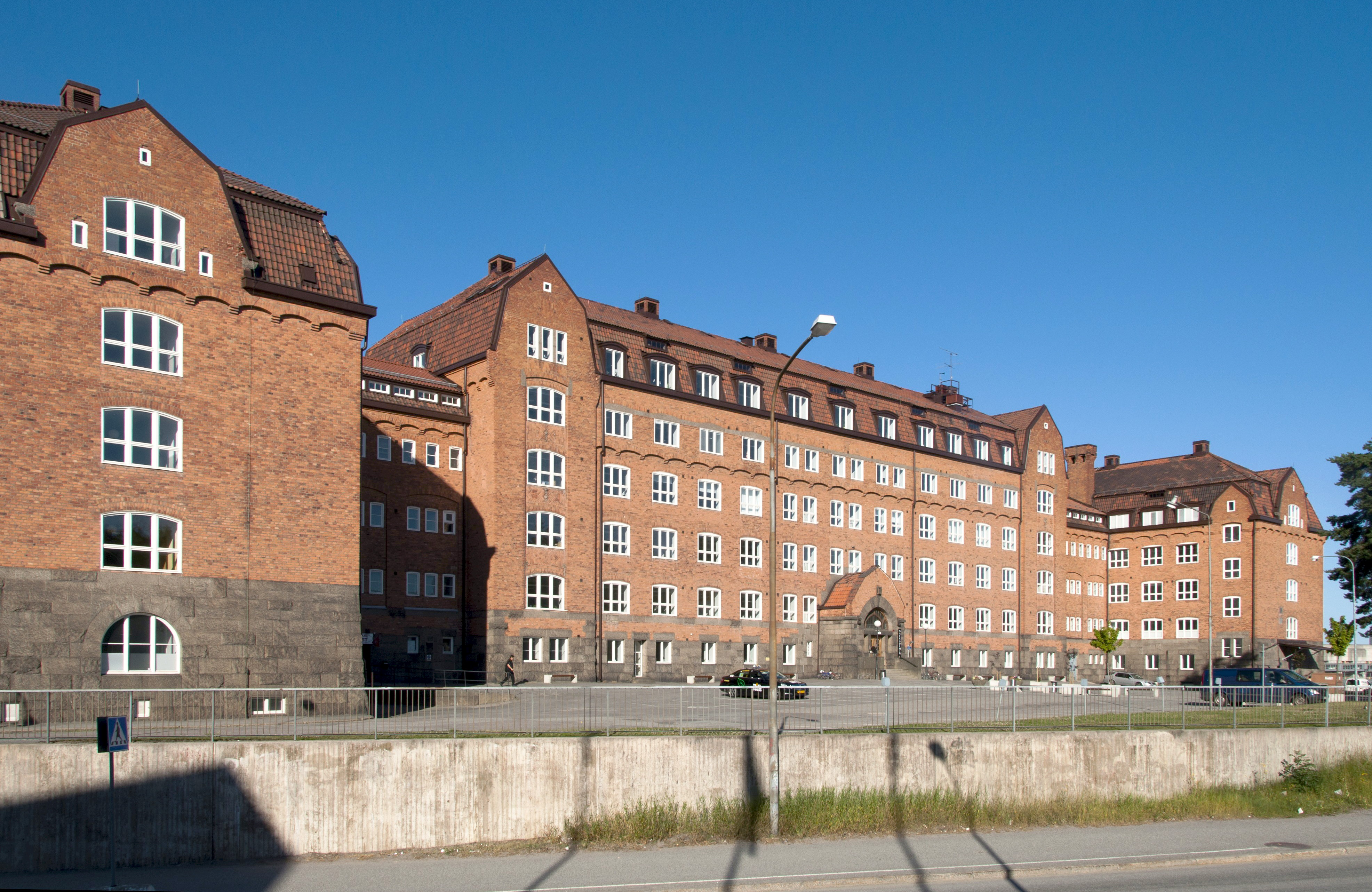 Kontrollkontoret, Tomtebodavägen 1-3, Nybyggnadsår 1912. Arkitekt var Folke Zettervall, inredningen utformades av A Ekengren.